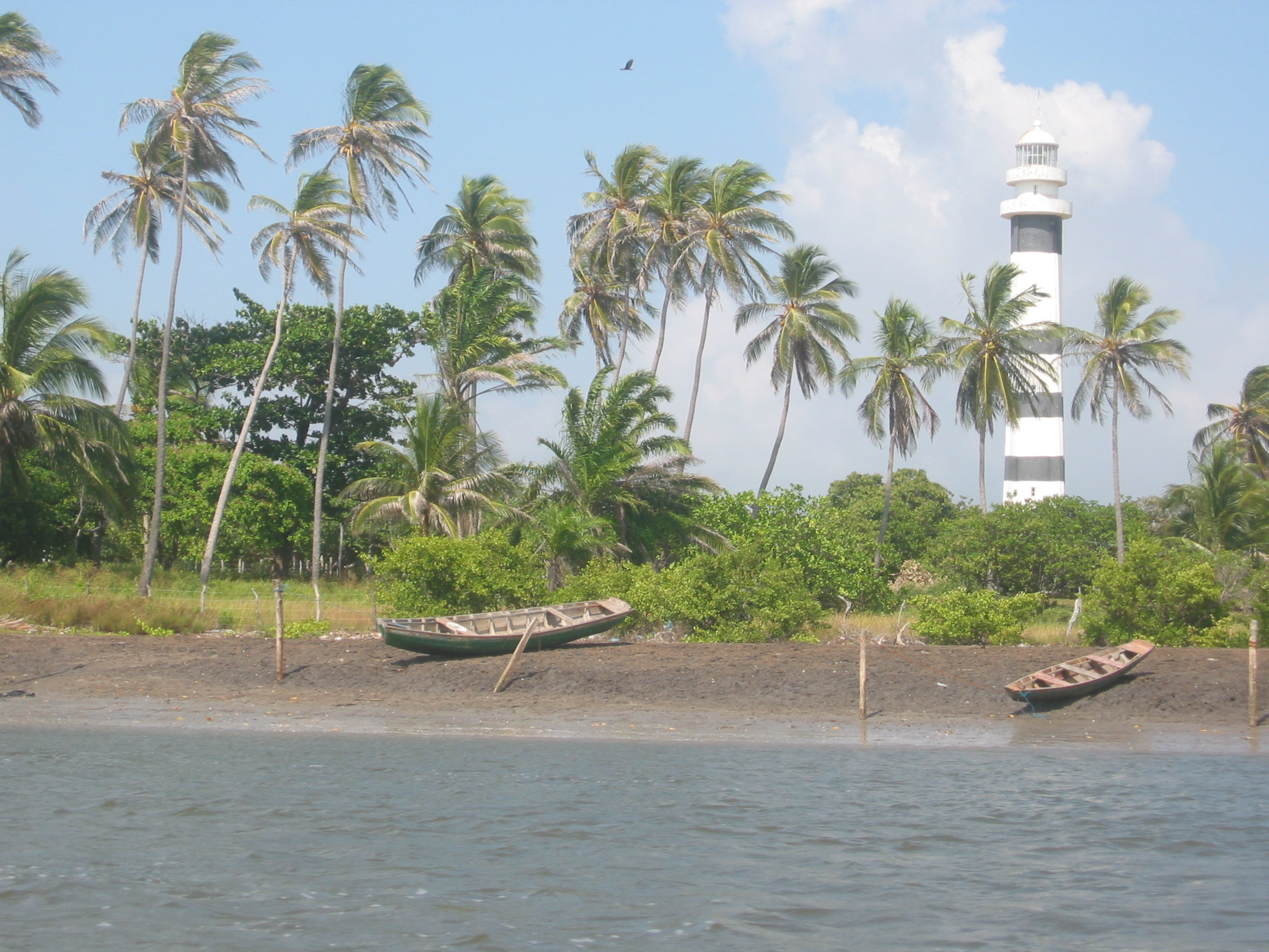 phare de Mandacaru